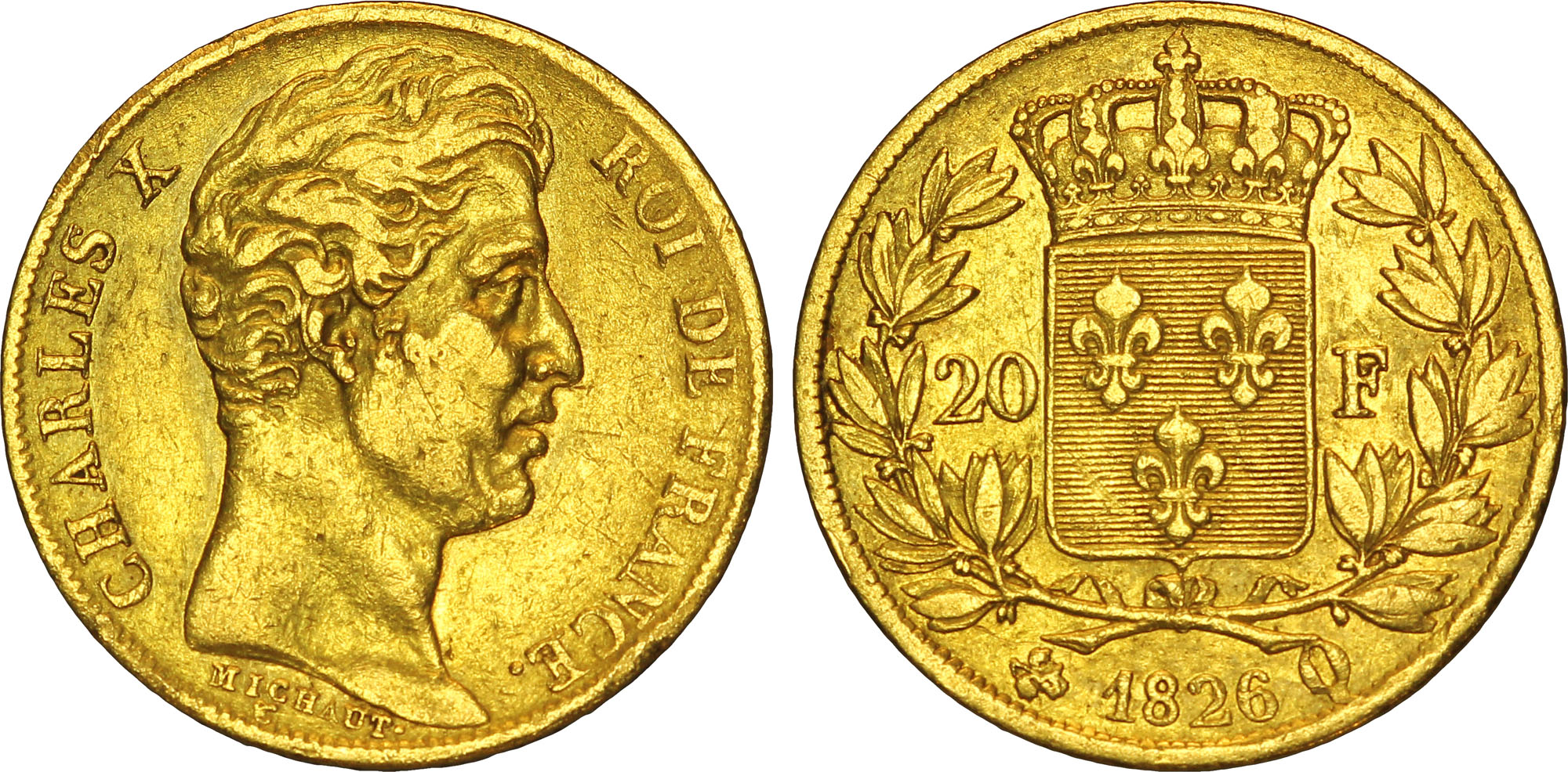 Nom de l'atelier : Perpignan Quantité frappée : 4538 exemplaires Métal : or Titre en millième : 900‰ Diamètre : 21mm Axe des coins : 6h. Poids : 6,38g. Titulature avers : CHARLES X - ROI DE FRANCE. Description avers : Tête nue de Charles X à droite ; signé MICHAUT. le long de la ligne de buste / T cursif au-dessous. Titulature revers : 20 - F// (Mm) 1826 Q. Description revers : Écu de France couronné entre deux branches d'olivier.